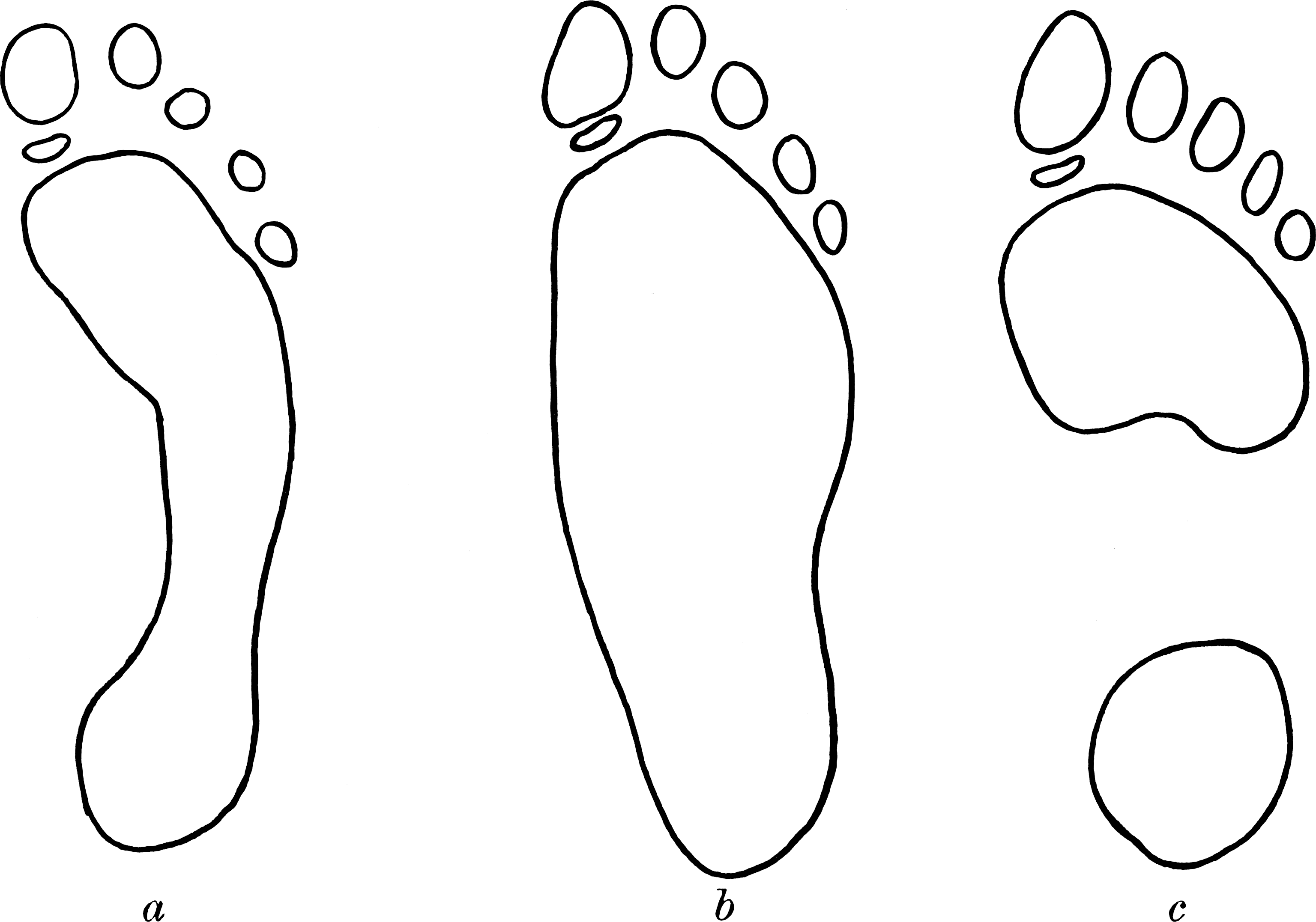 Die Körperpflege der Frau, Dr. C. H. Stratz 1907 Page 119; Fig. 53. Fussabdrucke (nach von Volkmann und Hoffa).